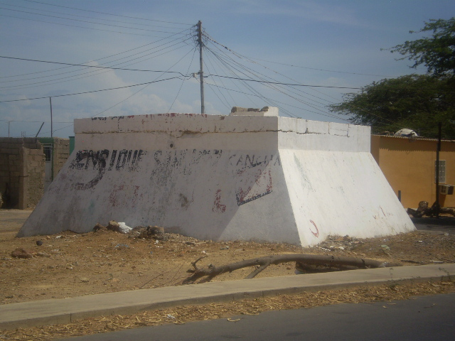 Tanquilla